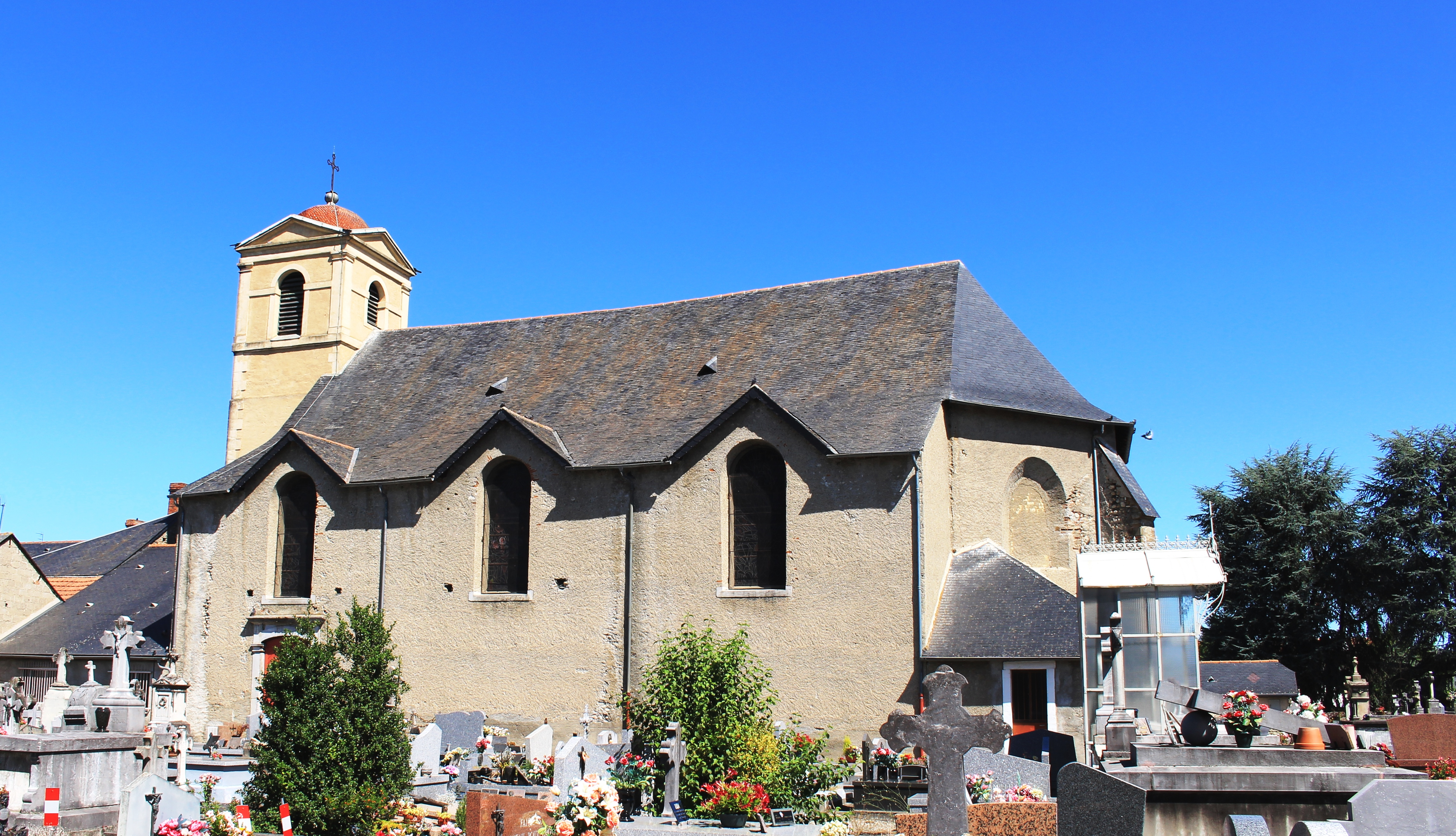 Église Saint-Guérin d'Aureilhan (Hautes-Pyrénées)